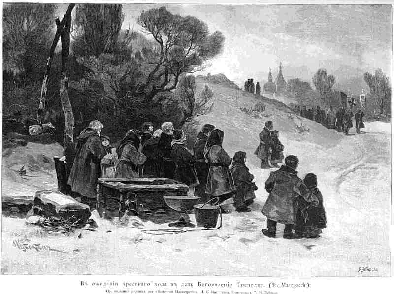 В ожидании крестного хода на Богоявление. "Всемирная иллюстрация", №1, 1898.